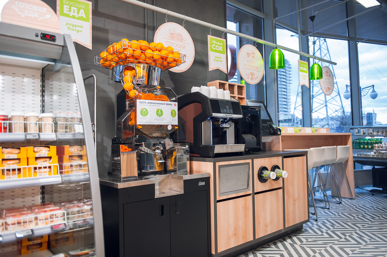 С декабря 2019 года все универсамы «Пятёрочка» открываются в новой концепции и с обновлённым дизайном. Появились пекарня, кофе-автомат, аппарат со свежевыжатыми соками, кассы самообслуживания разработки X5 Retail Group, зона для перекуса и зарядки гаджетов, покупательские корзины из переработанного пластика, многоразовые сумки из спанбонда и тканевые, бумажные пакеты и мешочки для фруктов и овощей, электронные ценники.